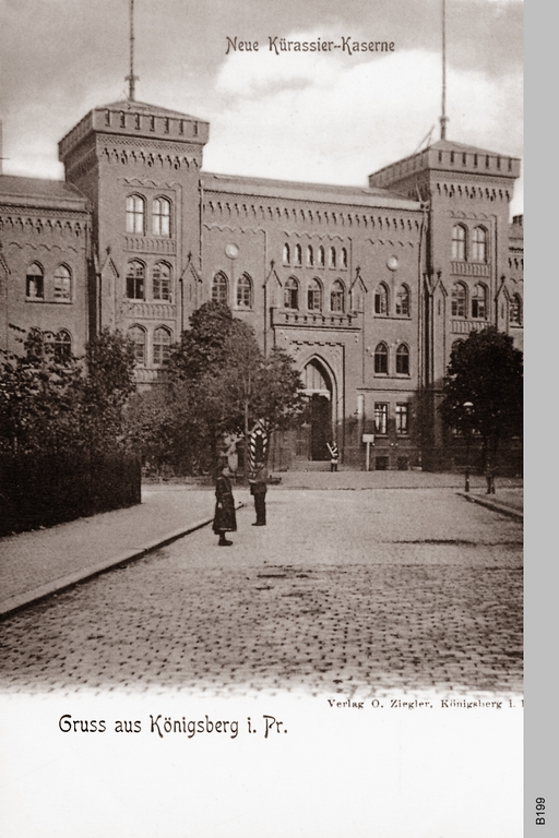 Kürasierkaserne in Königsberg